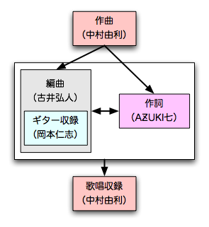 GARNET CROWの楽曲制作の流れを解説した図です。